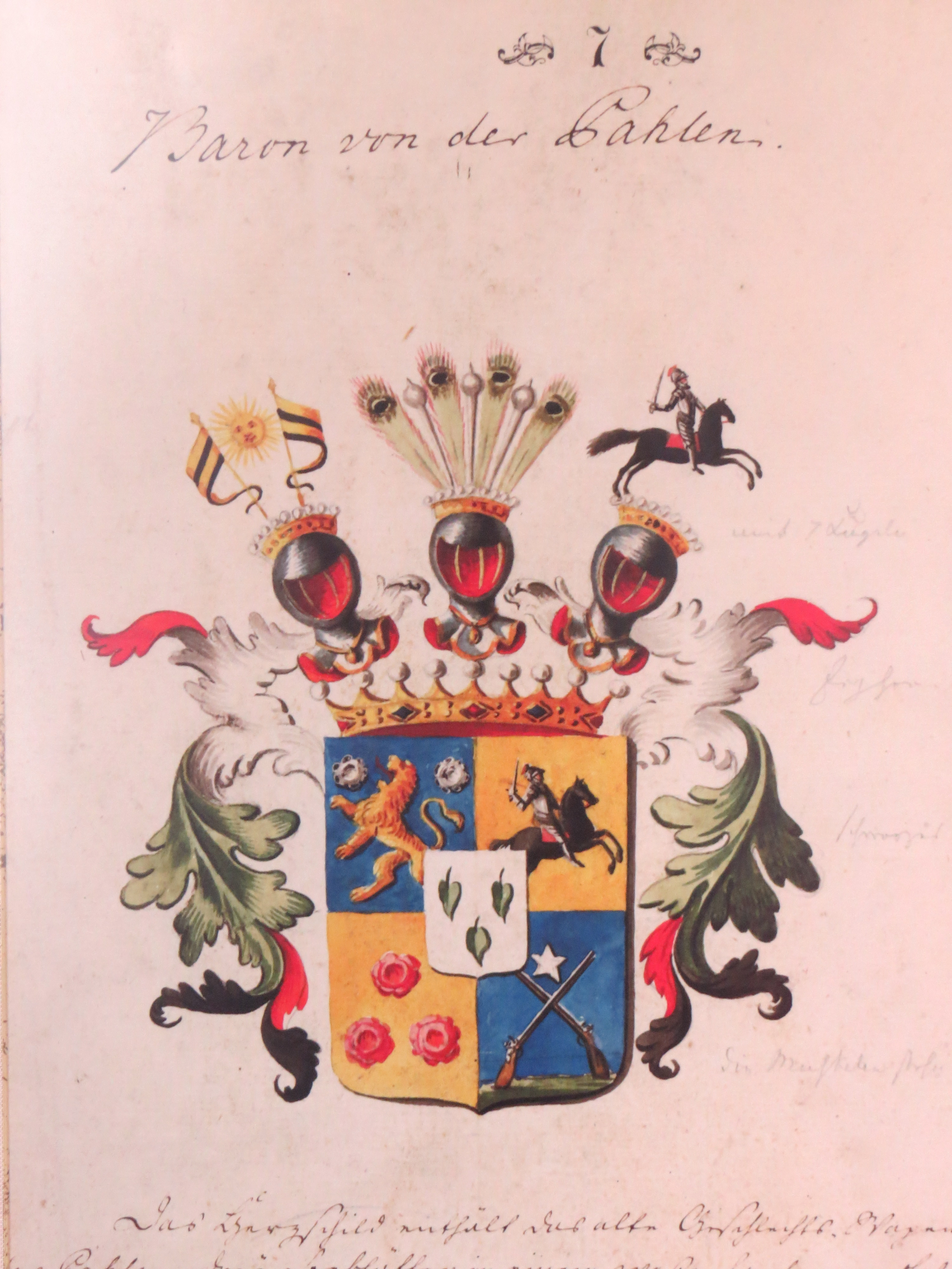 Baron von der Pahlens våben, fra Palmse herregård i Estland